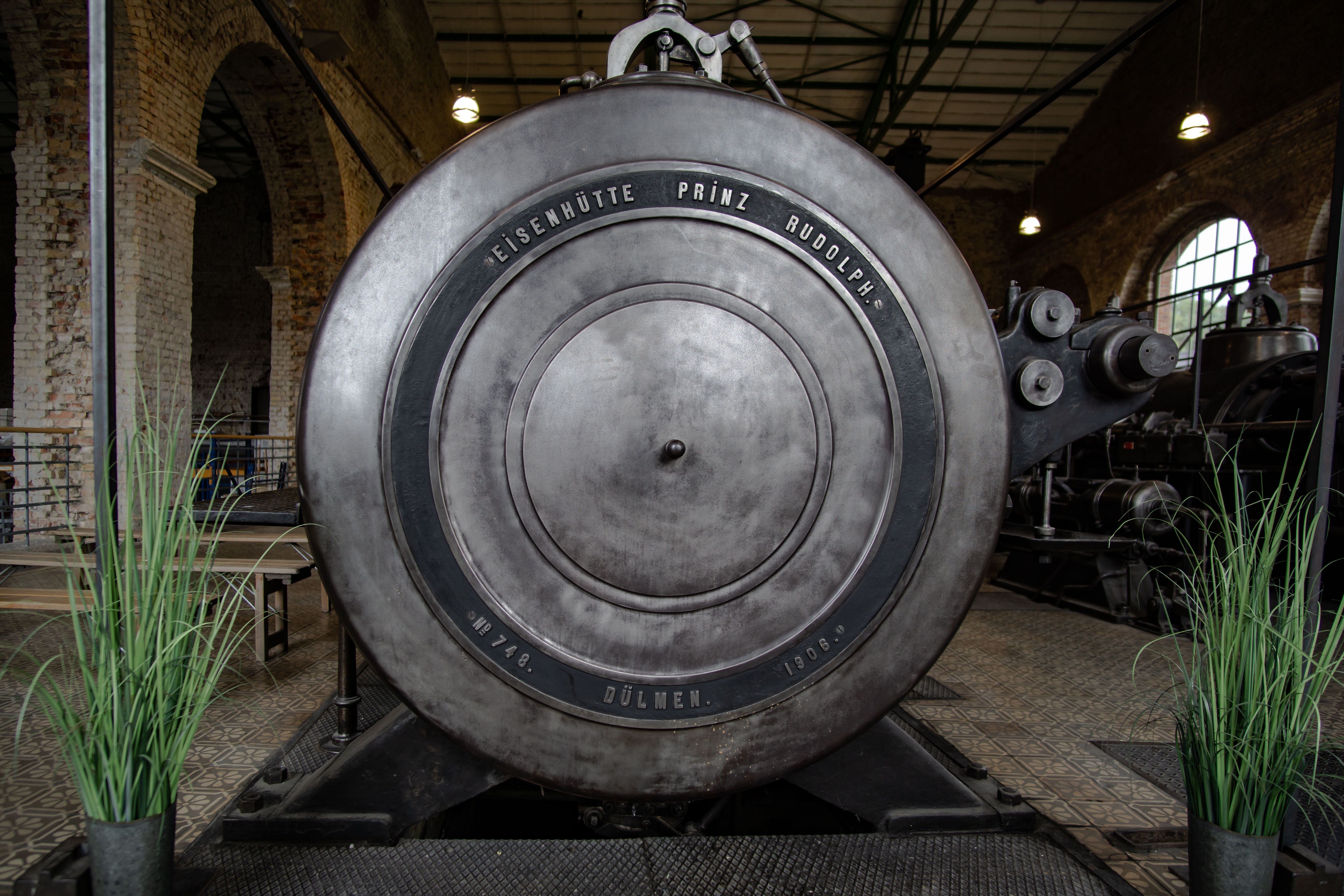 Tag des offenen Denkmals 2019: Zeche Waltrop - Maschinenhalle III/IV - Vierzylinder Tandem Fördermaschine der Eisenhütte Prinz Rudolph